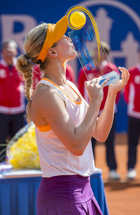 Damentennis,Eugenie Bouchard,Nürnberger Versicherungscup 2014,Tennis,WTA